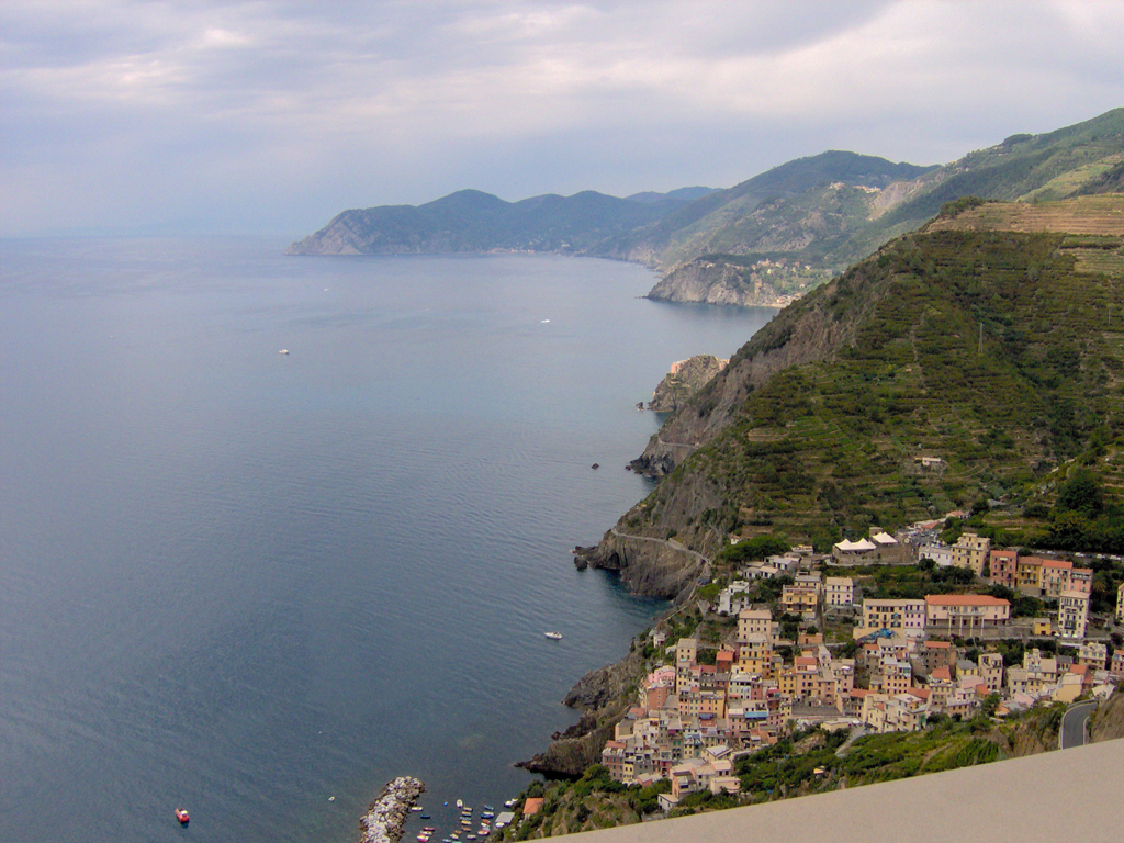 Costa delle 5 Terre, fotografata dalla Litoranea